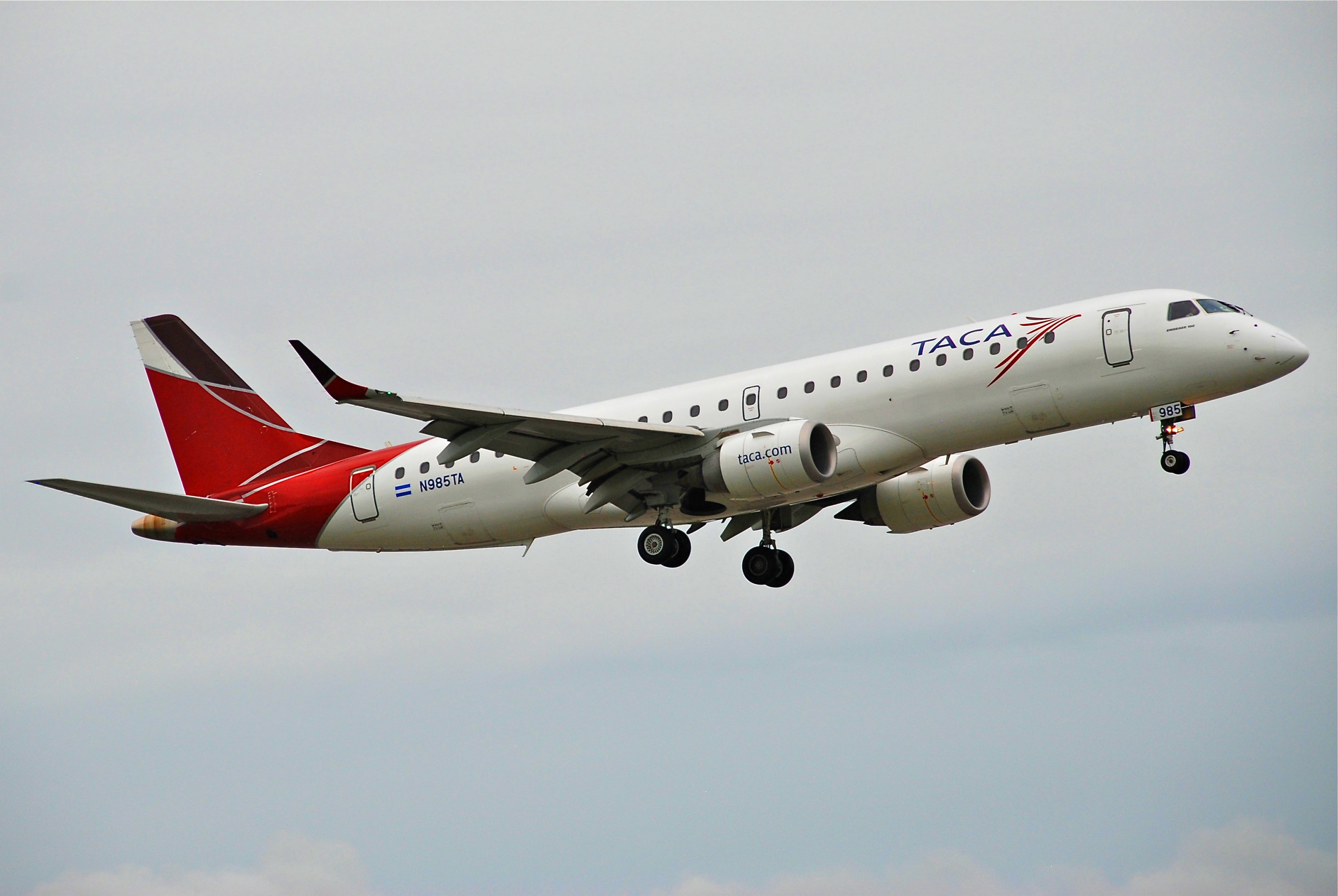 TACA Embraer ERJ190; N985TA@MIA;17.10.2011/626lq